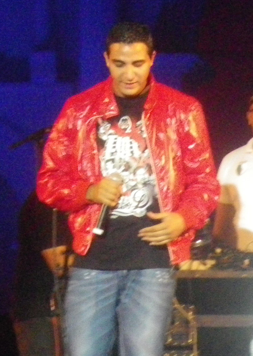 Algerino dans le FIT